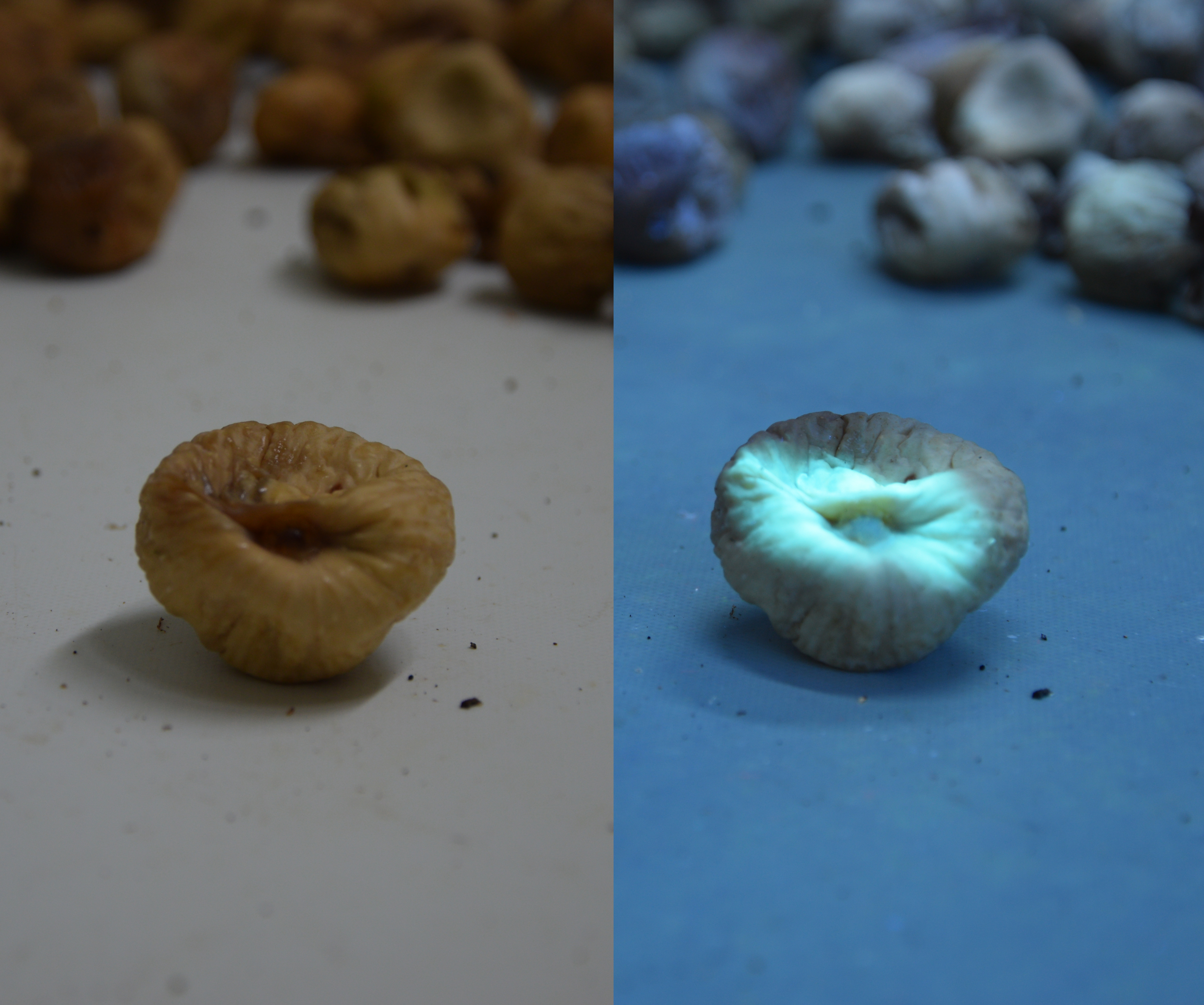 Fluorescenza emessa da aflatossina sottoposta a luce ultravioletta a destra. Stesso soggetto ma a luce naturale sulla sinistra.